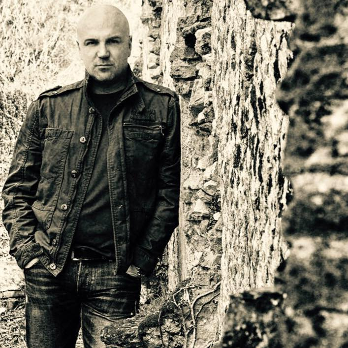 Foto pubblicata nel suo libro: "I padroni di sabbia"